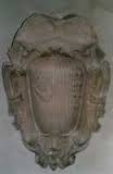 Stemma raffigurante i fregi delle famiglie Spadafora-Aragona-Moncada. Collocato sul portale del Castello di Venetico (oggi di mia proprietà), è stato trasferito nel 1925 da mio nonno Alberto Samonà Monroy nel Castello di Spadafora, ove si trova tutt'ora.